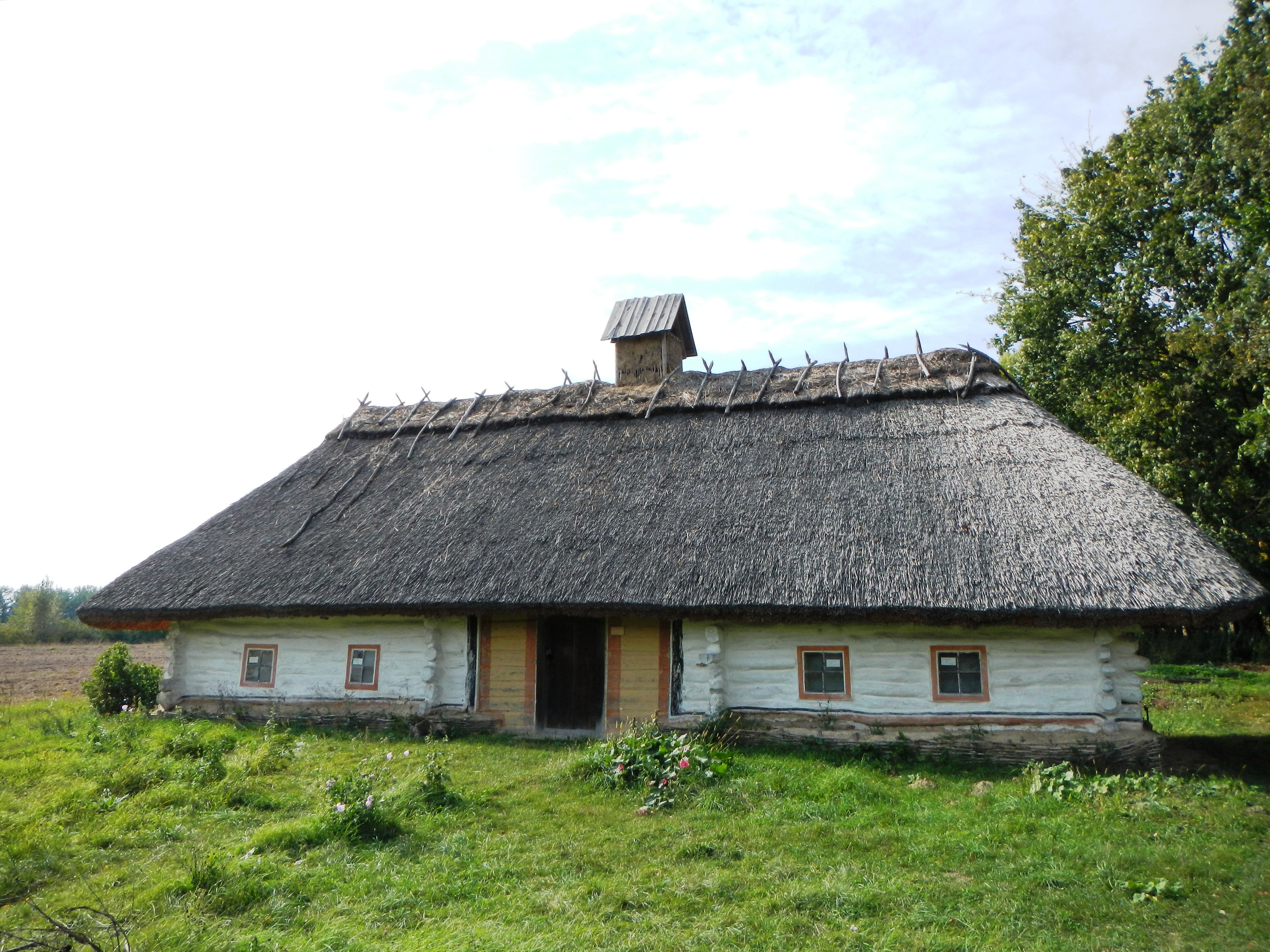 Хата сер. ХVІІІ ст. з с. Рижавка Уманського р-ну Черкаської обл. Пирогів, Київ.